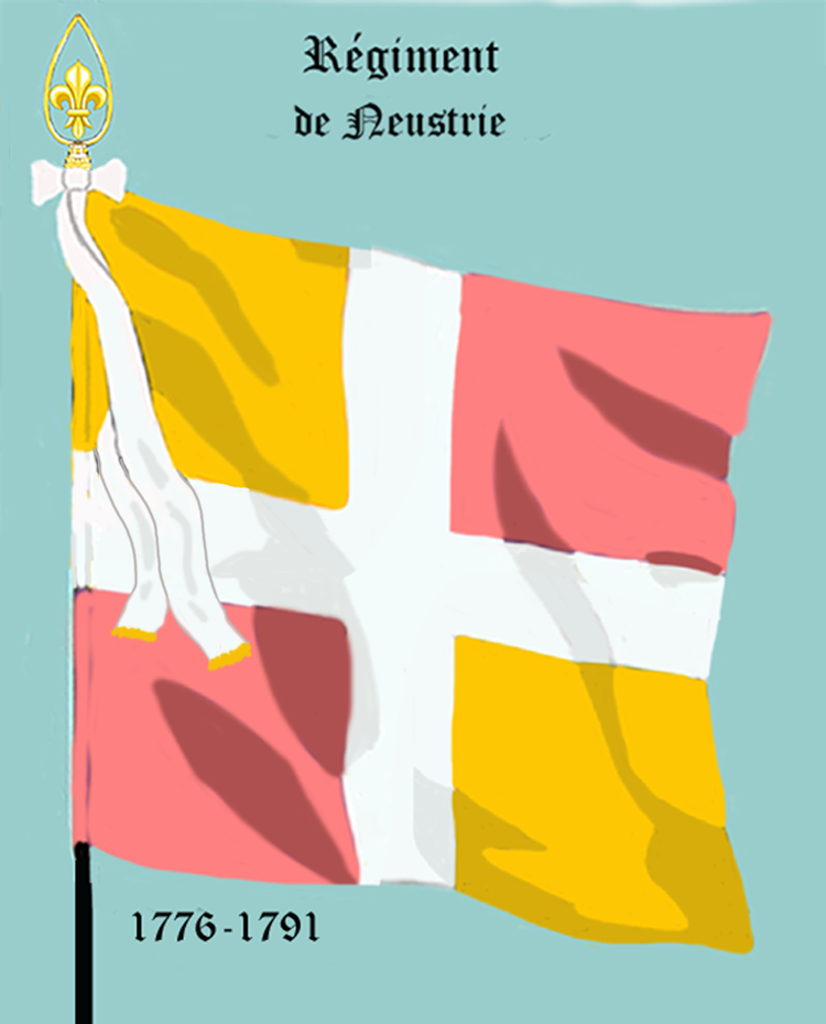 Ordonnanzfahne eines königlich französischen Infanterie-Regiments. - Entnommen und überarbeitet aus: „LES UNIFORMES ET LES DRAPEAUX DE L'ARMÉE DU ROI“ Marseille 1899. (Drapeau d'ordonnance d' un régiment française d'infanterie royale.)